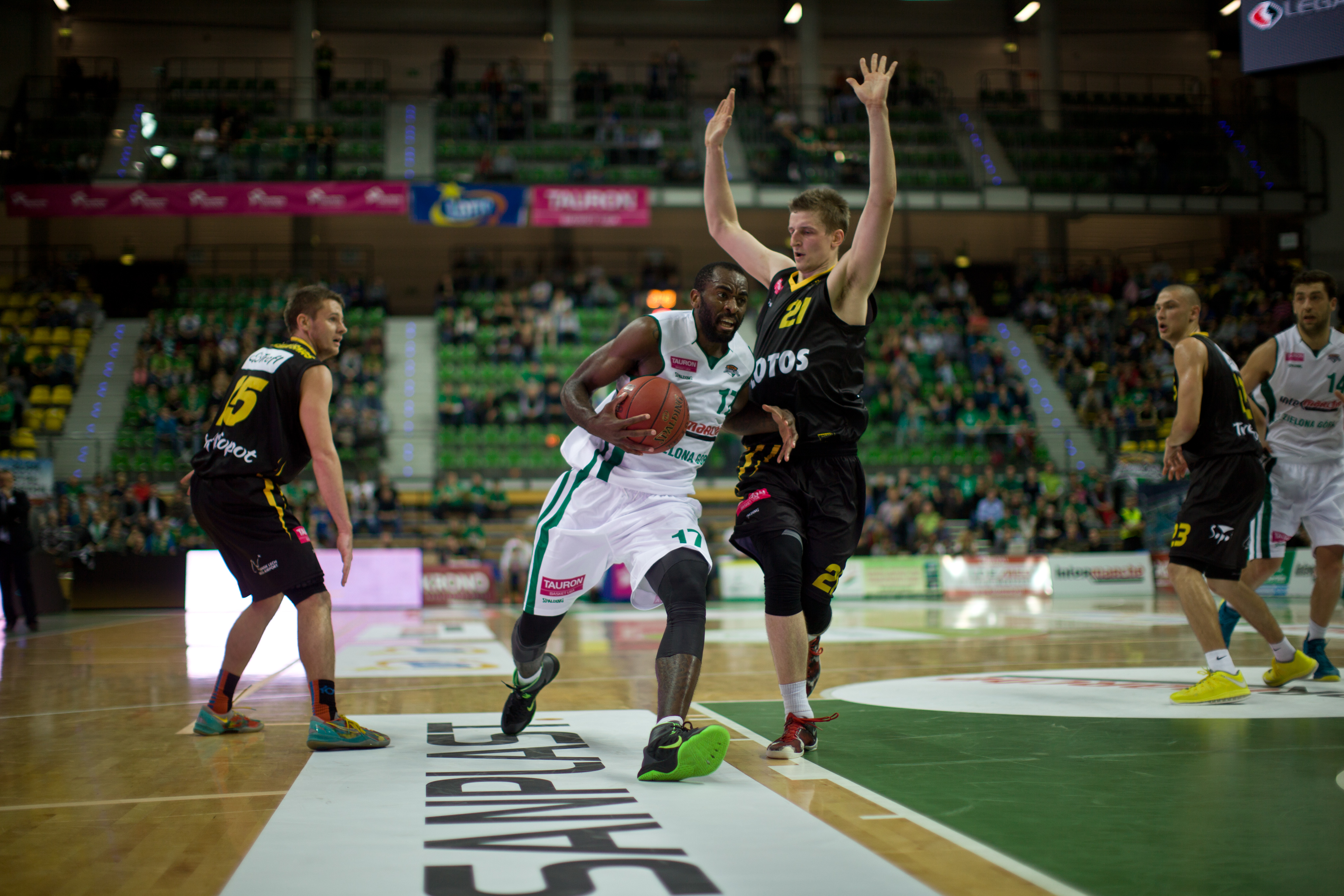 Christian Eyenga, Stelmet Zielona Góra, Adam Waczyński, Treﬂ Sopot